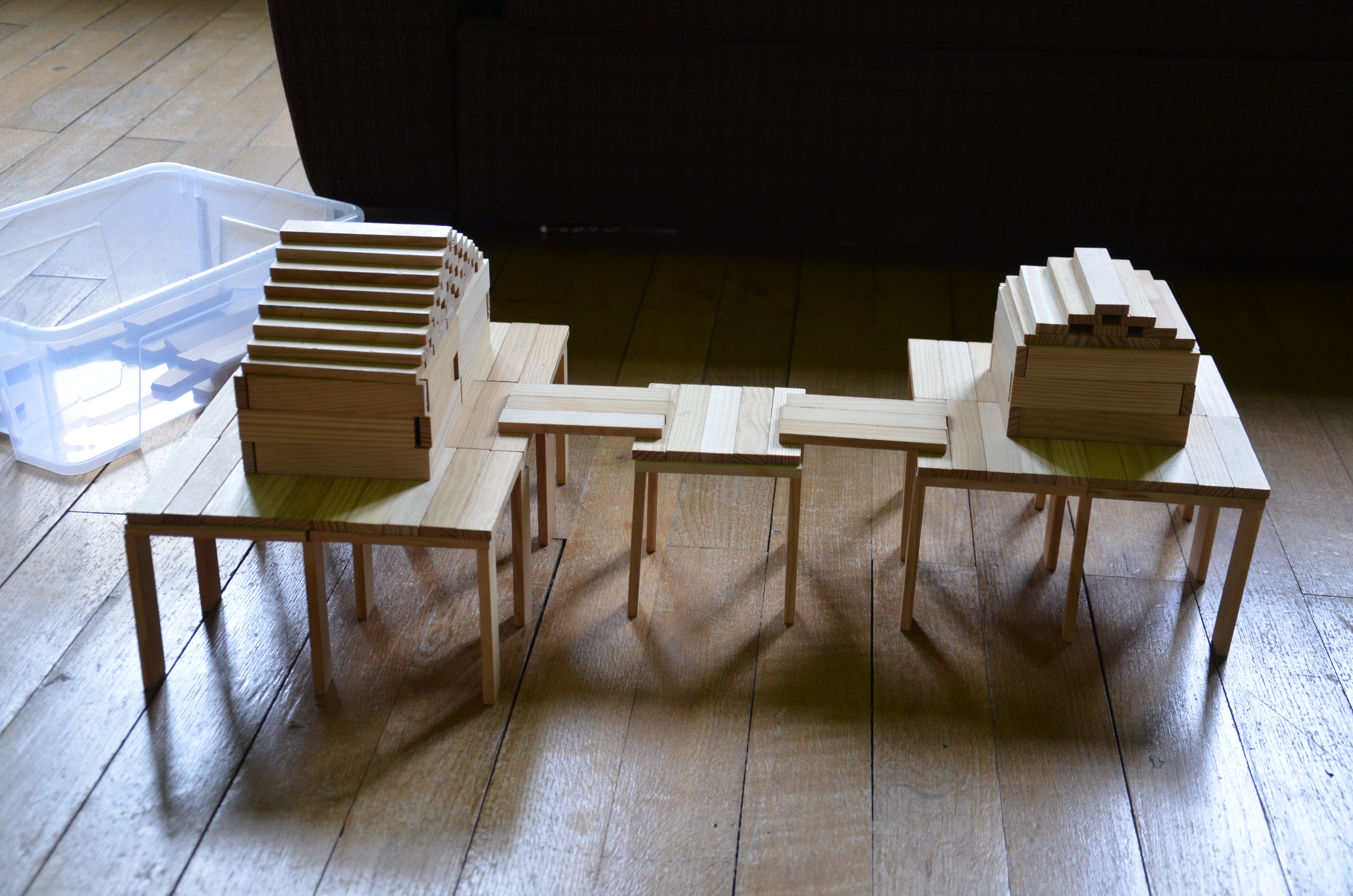 Maisons sur pilotis en Kapla.